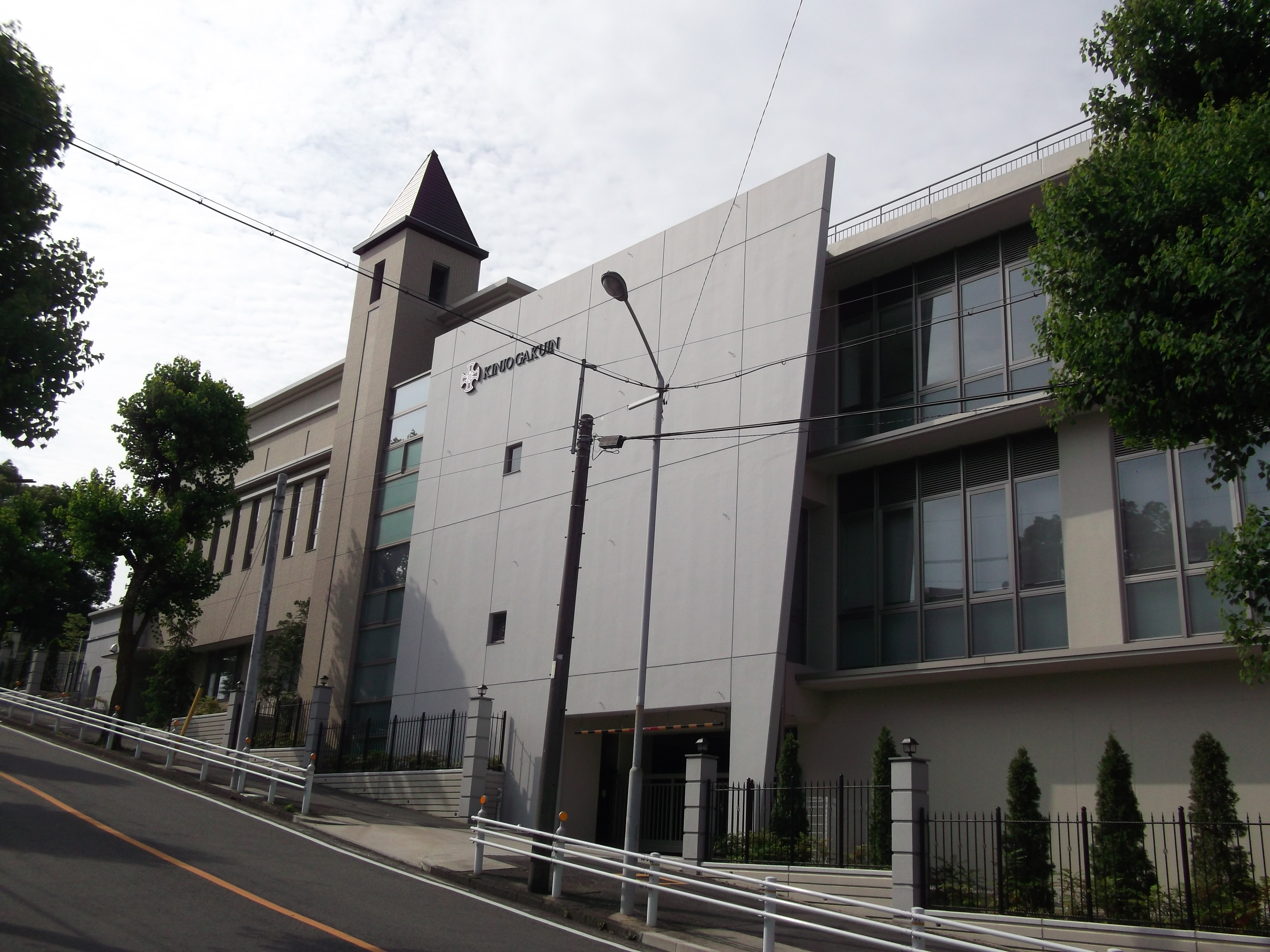 名古屋市東区にある金城学院中学校を北側から写す